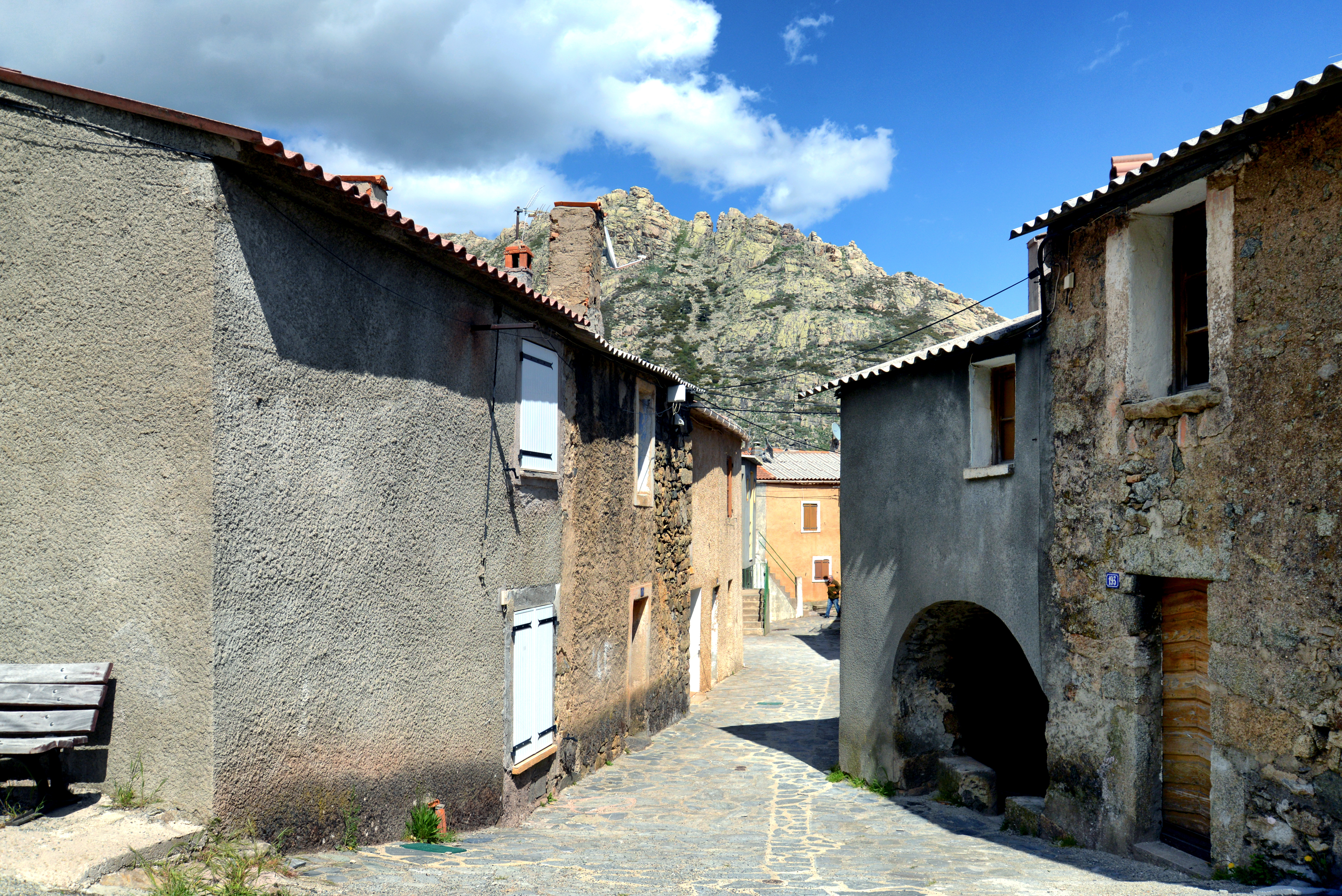 Albertacce, Niolo (Corse) - Ruelle de Calasima, le plus haut village de Corse